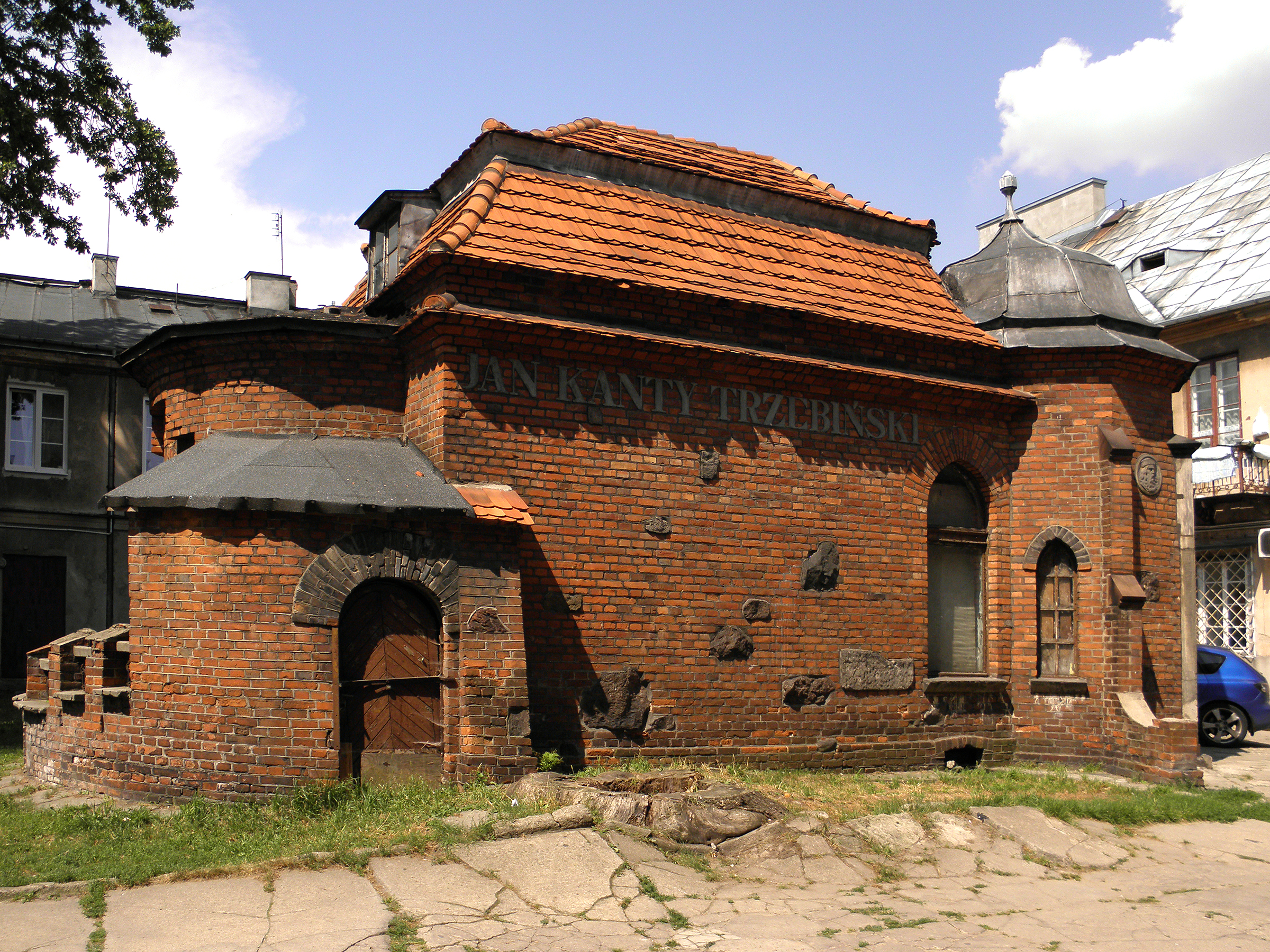 Radom - dawna drukarnia J.K. Trzebińskiego.